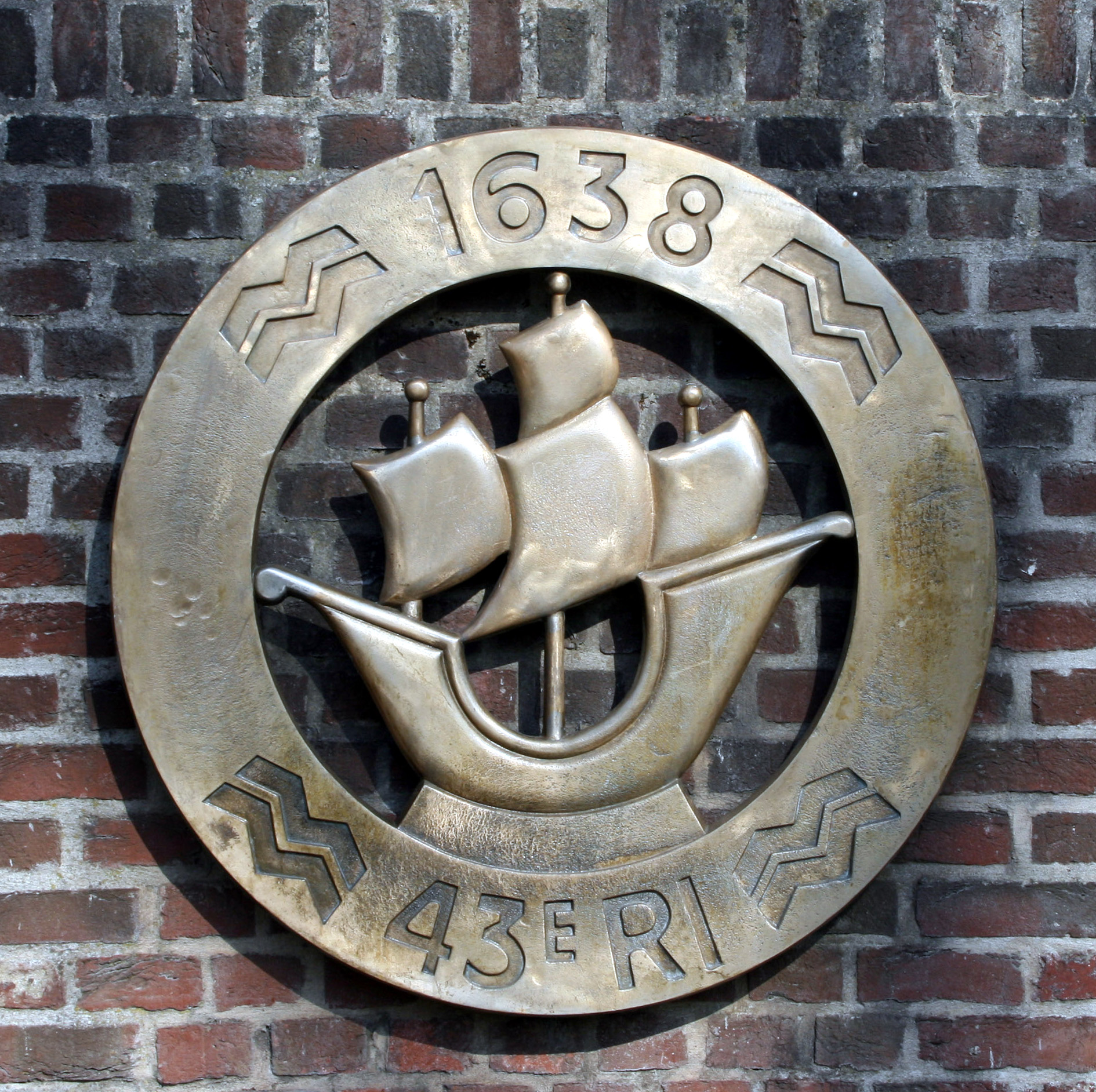 Insigne du 43ème RI dans la Citadelle Vauban à Lille